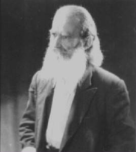 António Gonçalves Correia na senioridade.